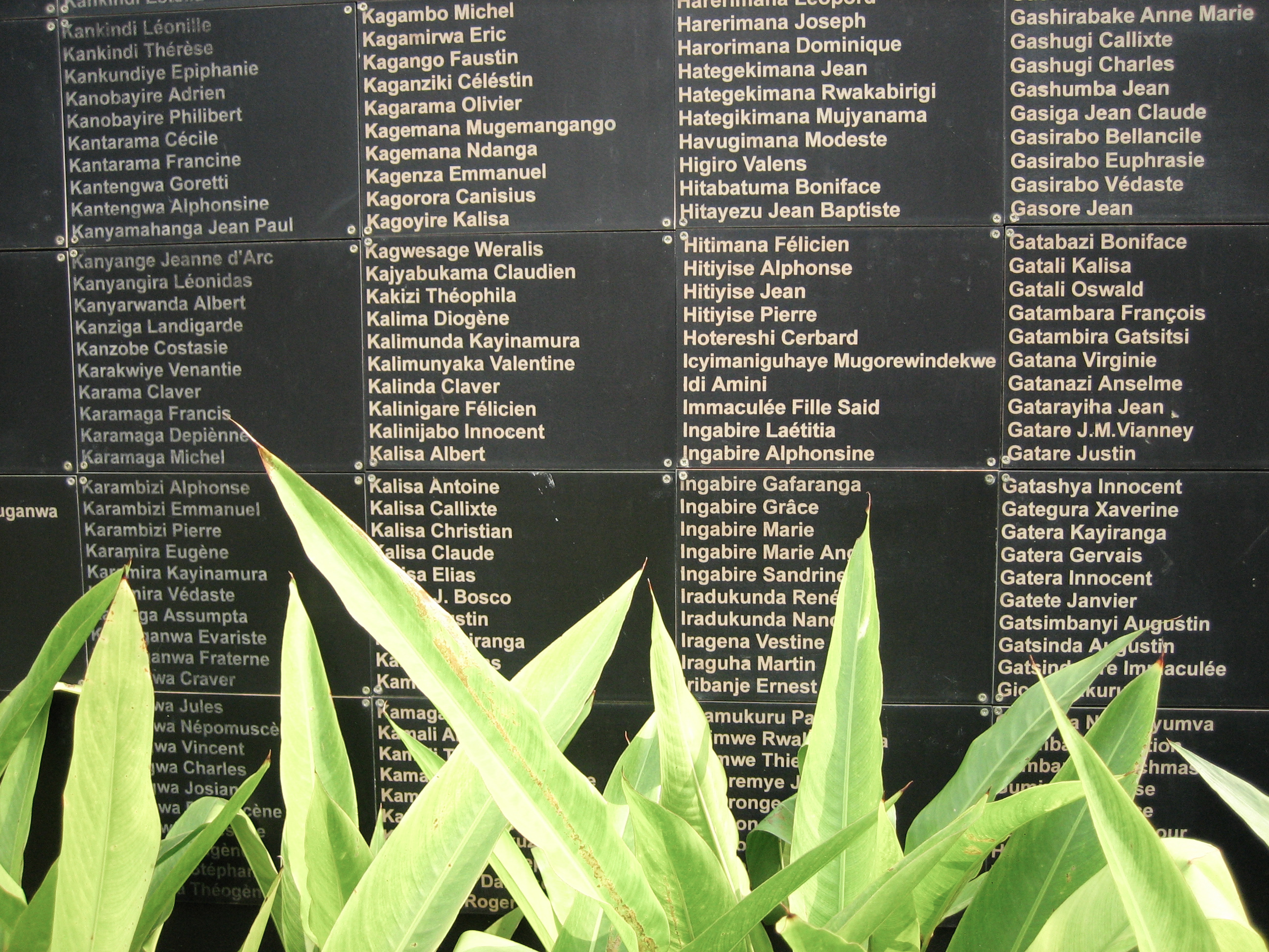 Kigali Memorial Centre, Gisozi.